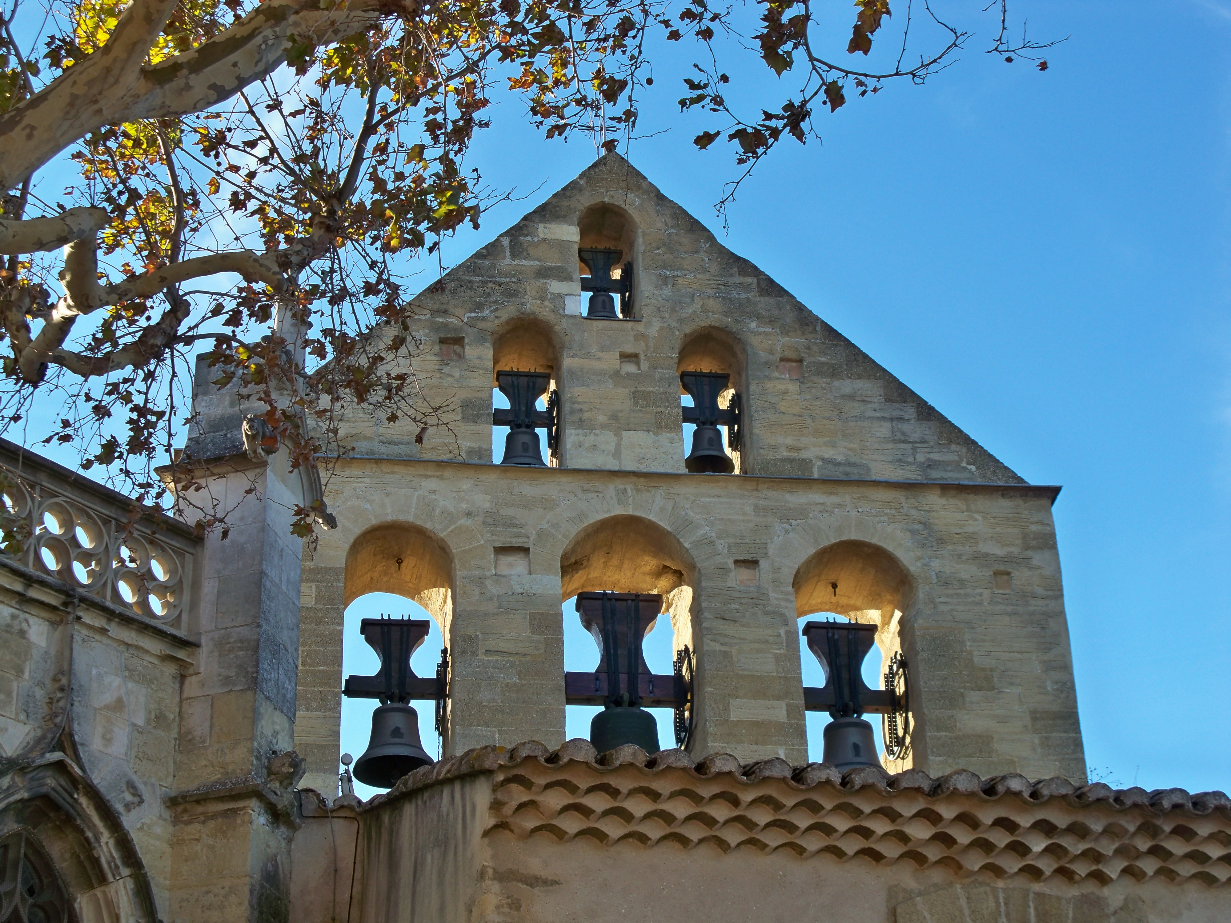 clocher de l'église Saint Michel de Caderousse, Vaucluse, France